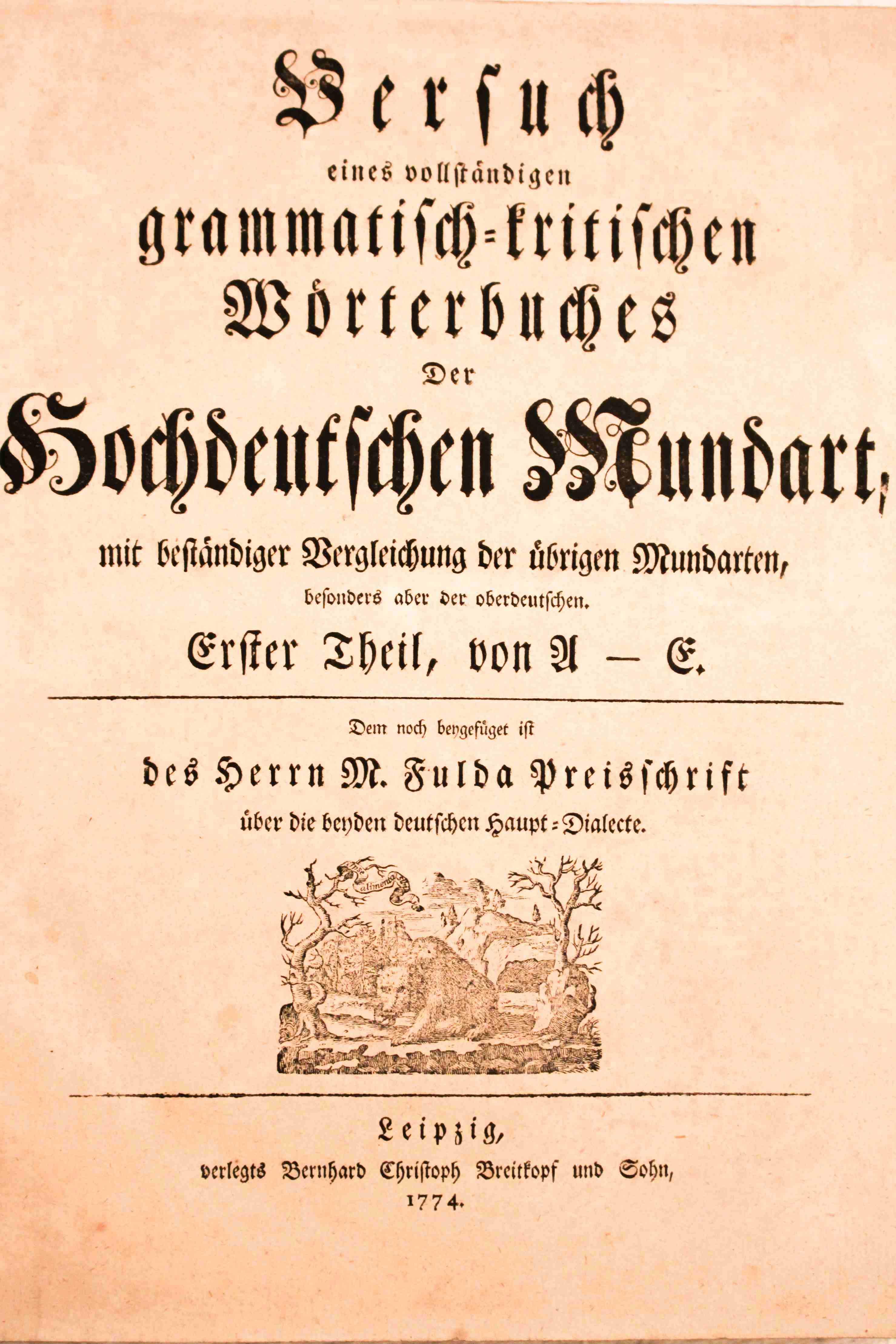 Titelblatt des ersten deutschen Wörterbuches von Johann Christoph Adelung 1774; Erster Band A - E